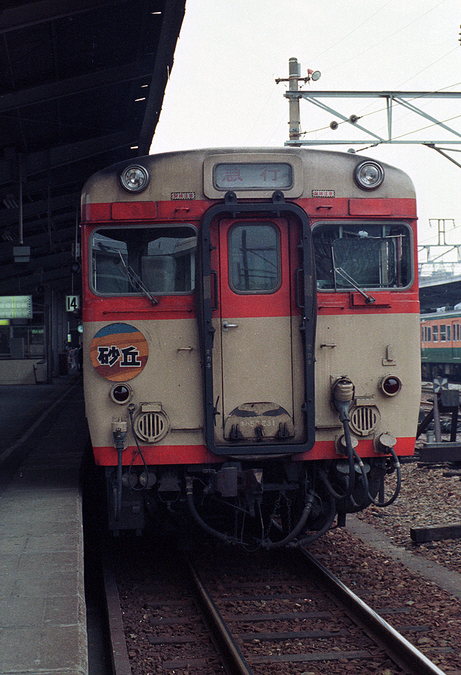 急行 砂丘 ヘッドマーク